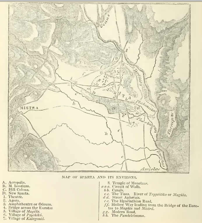 Plan des ruines de la Sparte antique et des environs du site au milieu du XIXe siècle. Carte dans William Smith (dir.), "Dictionary of Greek and Roman Geography", Londres, Walton and Mabberly, 1857, volume 2, page 1030. Légende de la carte : A. Acropole. B. Mont Issorium. C. Colline Colona. D. Nouvelle Sparte. 1. Théâtre. 2. Agora. 3. Amphithéâtre ou Odéon. 4. Pont sur l'Eurotas. 5. Village de Magula. 6. Village de Psychiko. 7. Village de Kalagonia. 8. Temple de Ménélas. aaa. Circuit de murs. bb. Canaux. cc. La Tiasa. Rivière de Tripyotiko ou Magula. dd. Rue Aphetais. ee. La Route Hyacinthienne. ff. Chemin creux depuis le pont sur l'Eurotas jusqu'à Magula et Mistra. gg. Route moderne. hh. Le Pandeleimona.